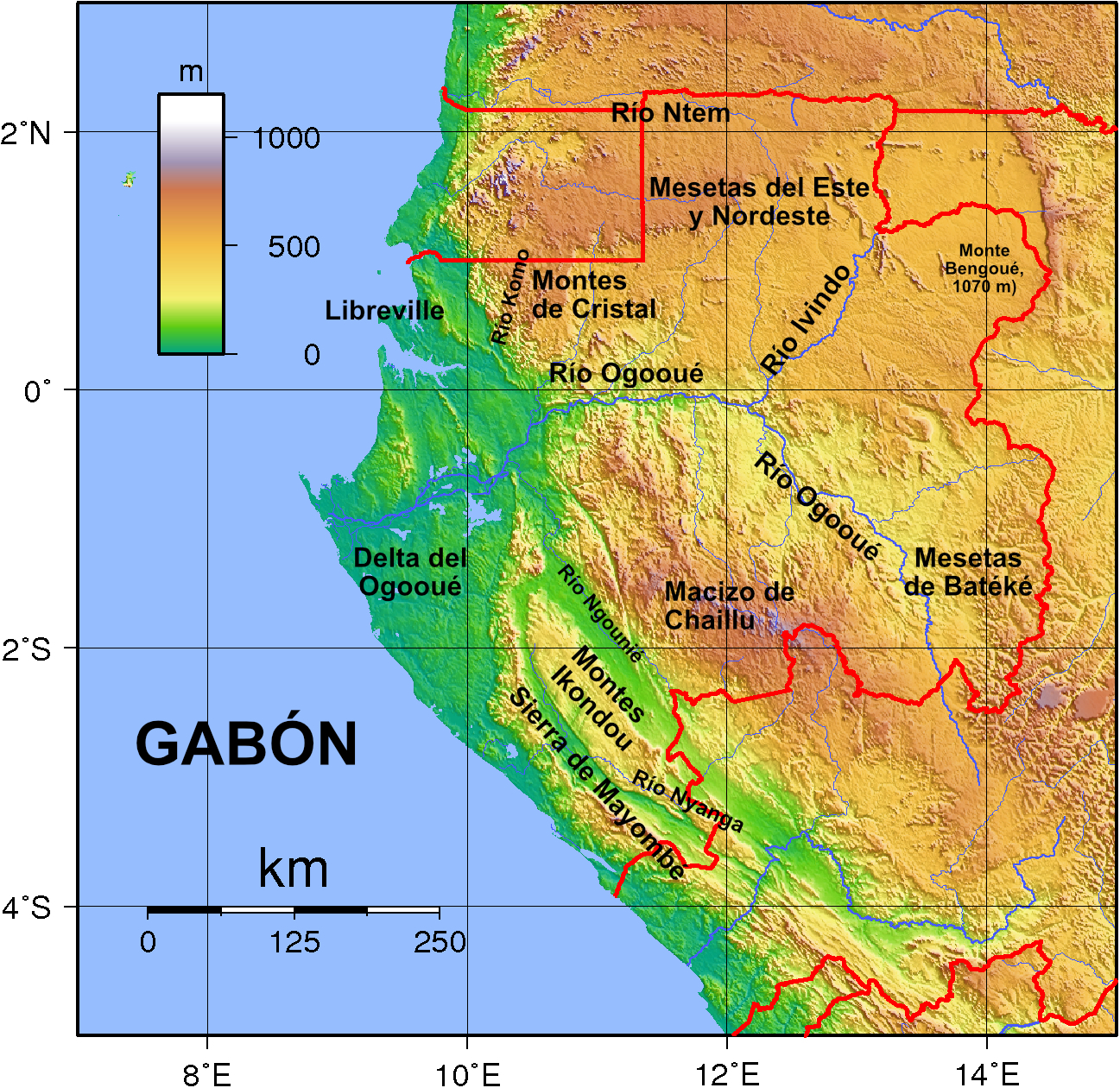 Utilizo mapa topográfico de wikipedia para añadir nombres